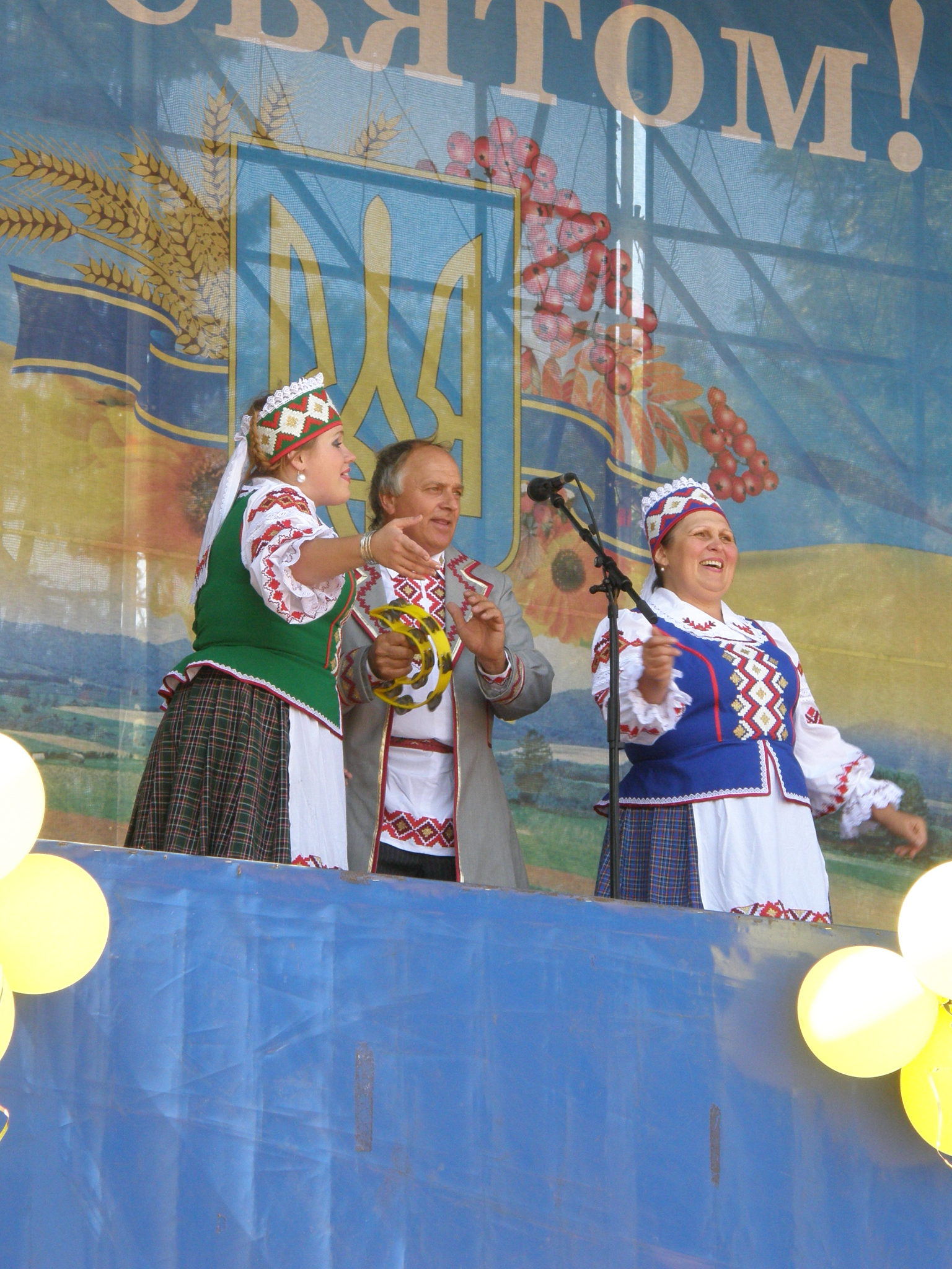 Донецк. Празднование дня независимости Украины.